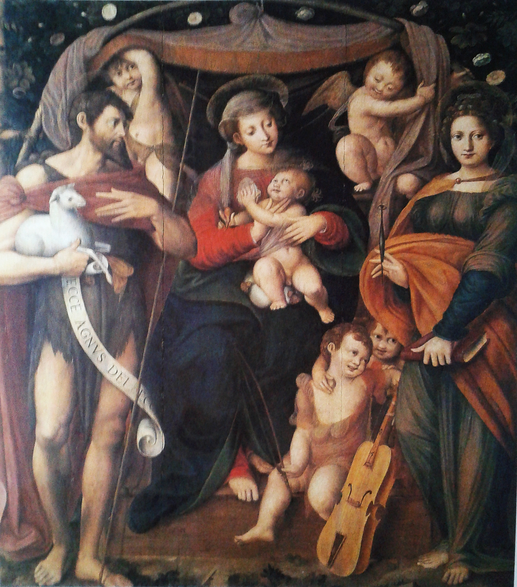 Ottaviano Cane, "Madonna con il Bambino e i santi Giovanni Battista, Lucia e angeli musicanti" (post 1535), Torino, Galleria Sabauda.